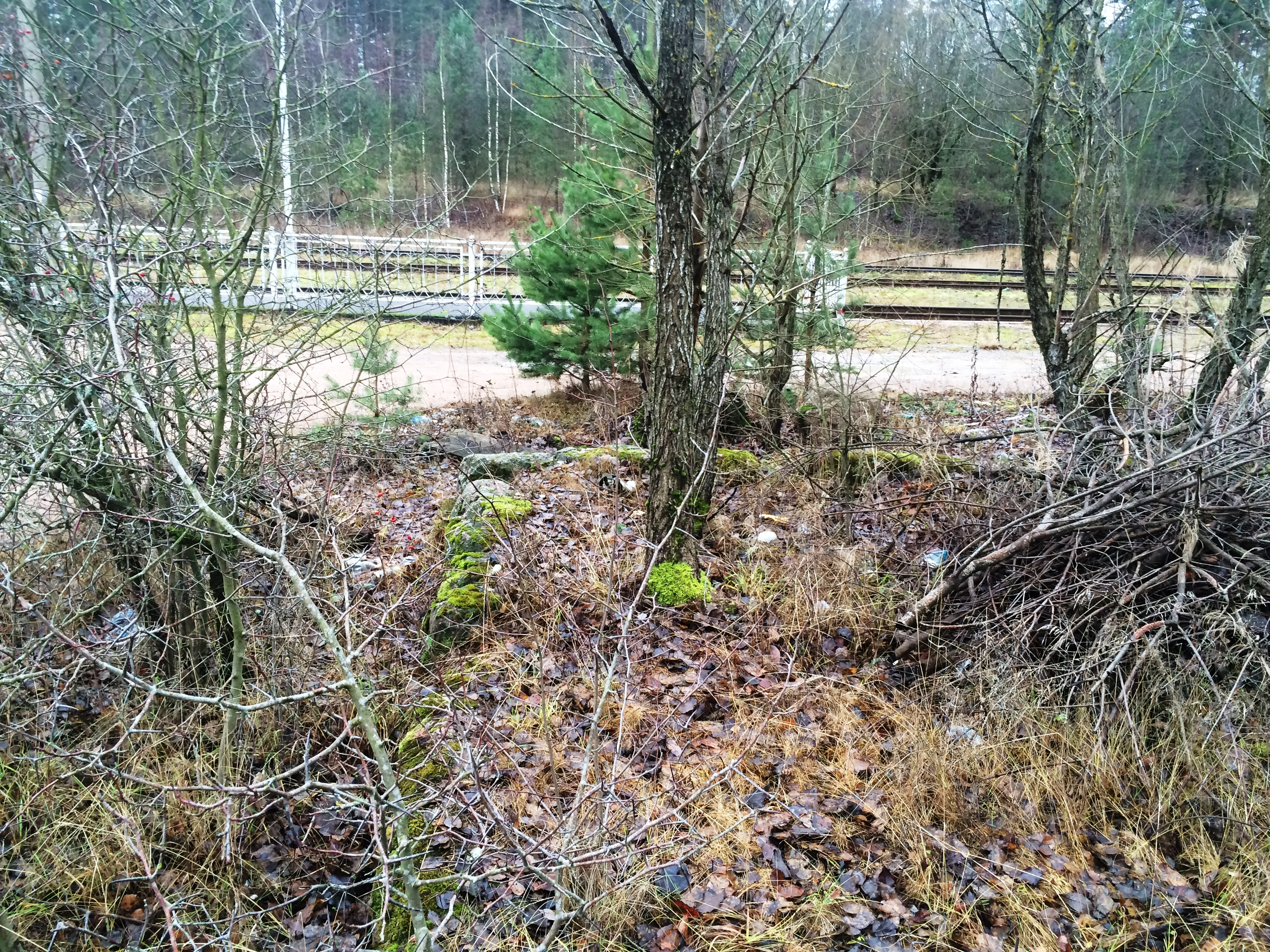 Фрагменты фундамента бывшего вокзала.